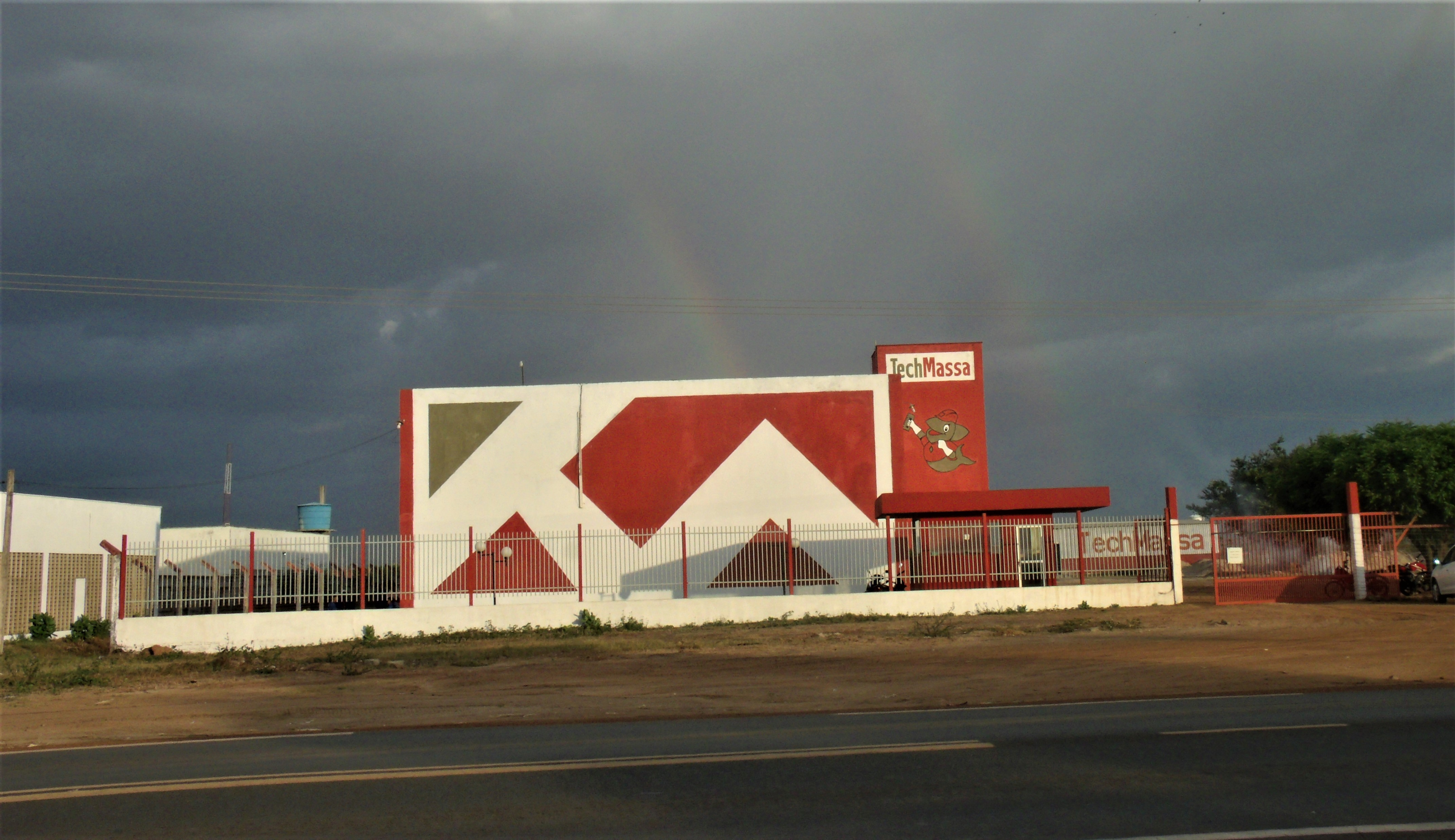 Fábrica de argamassas e rejuntes, Tec Massa, em Campo Maior (Piauí).